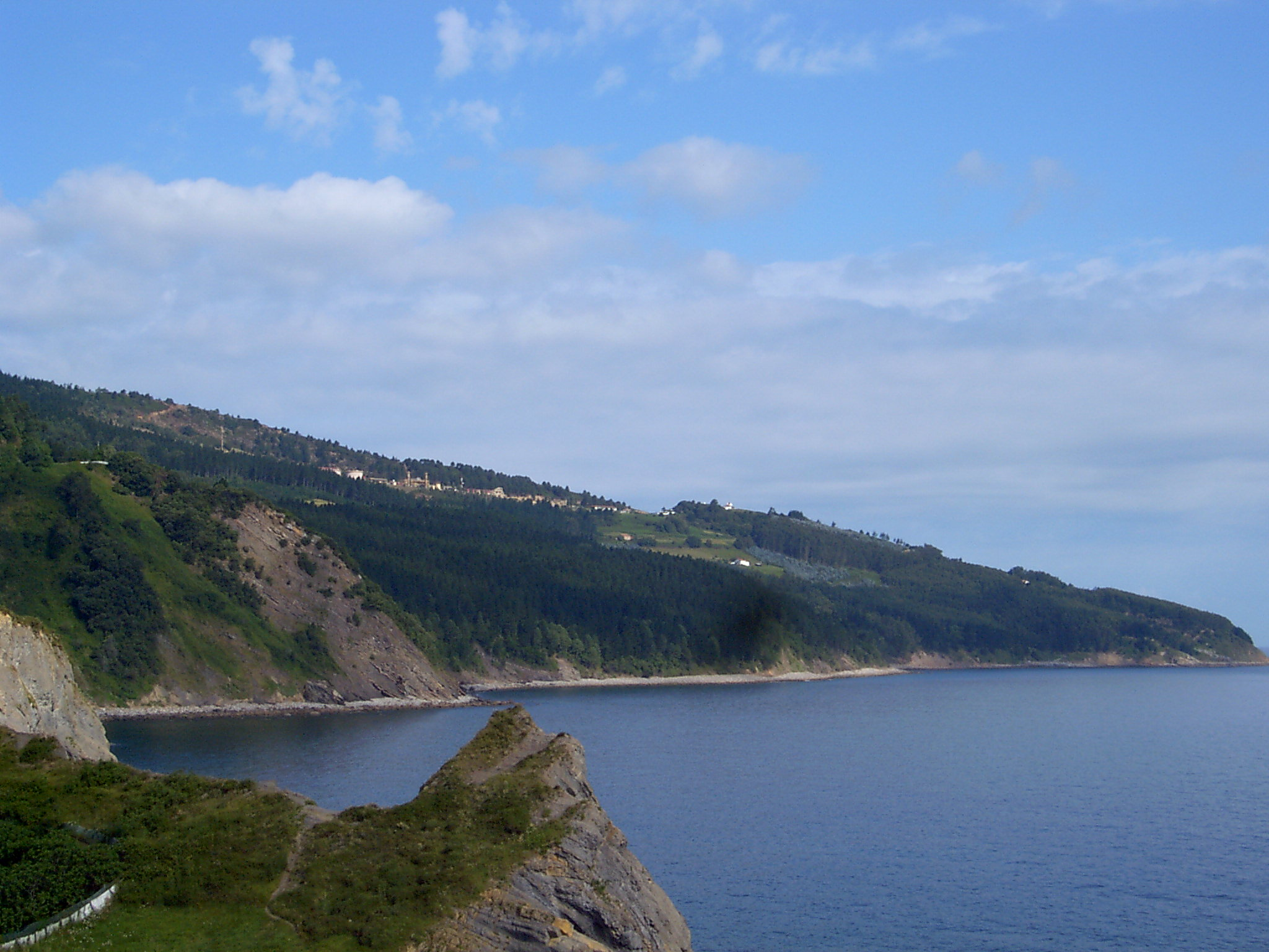 matxitxako cape